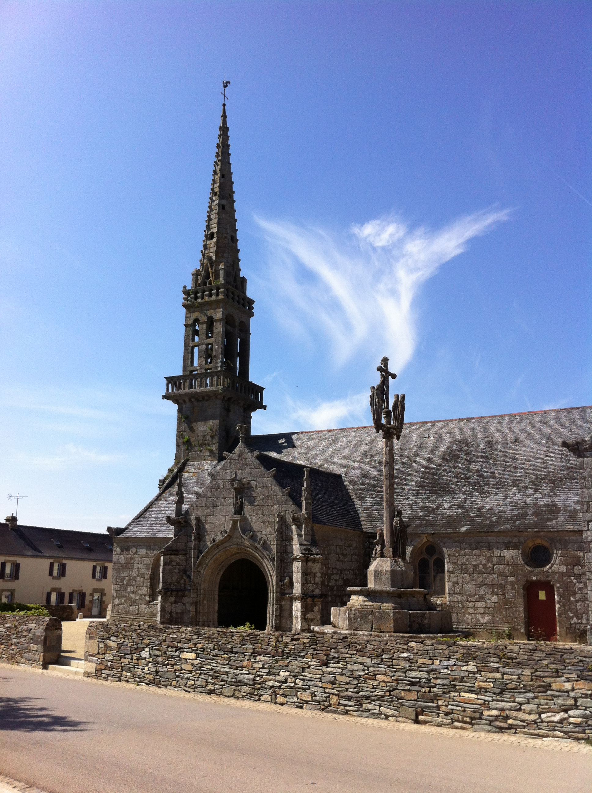 Eglise Saint Jérôme - Cast